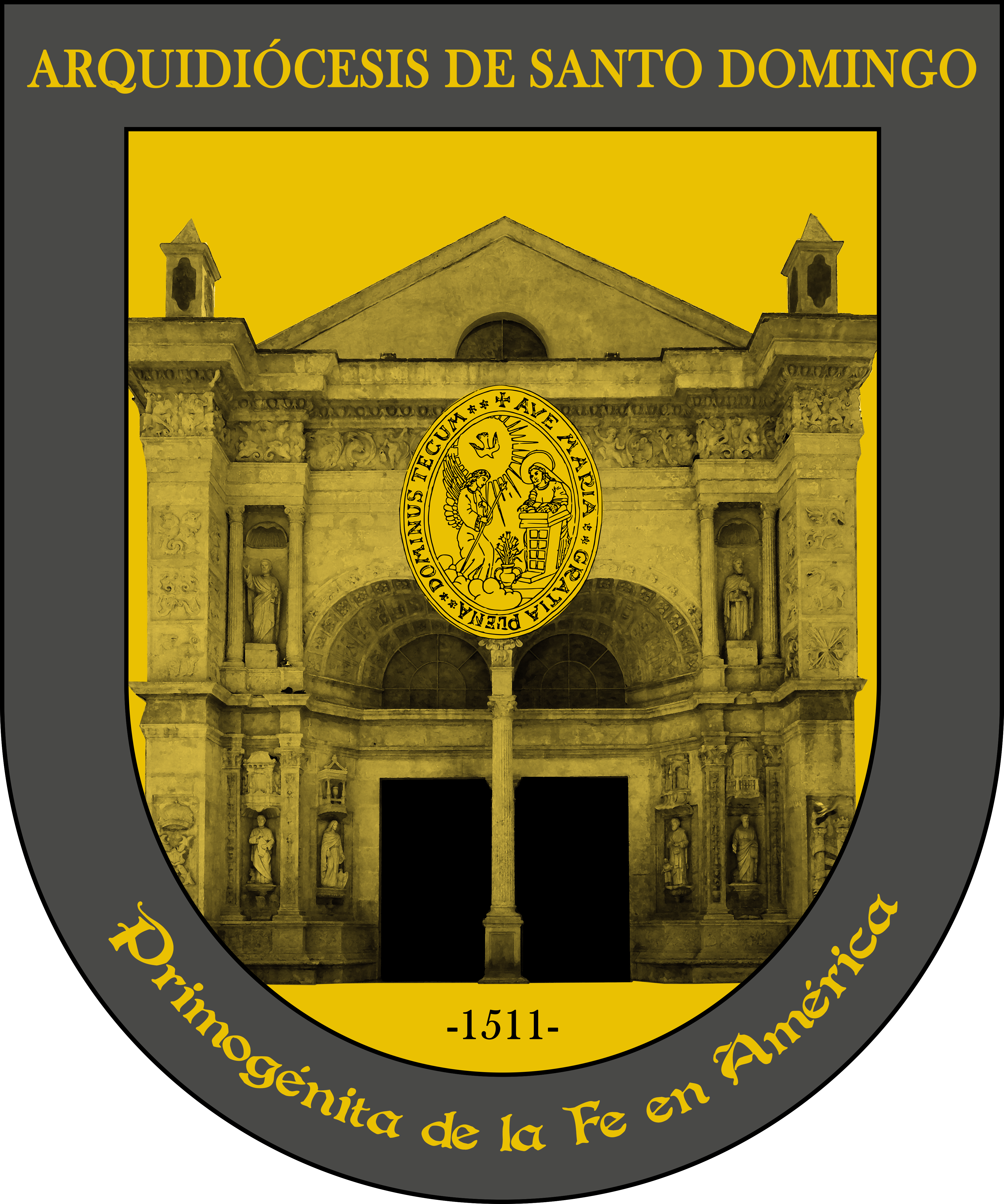 Escudo de la Arquidiócesis de Santo Domingo, República Dominicana. Referencia